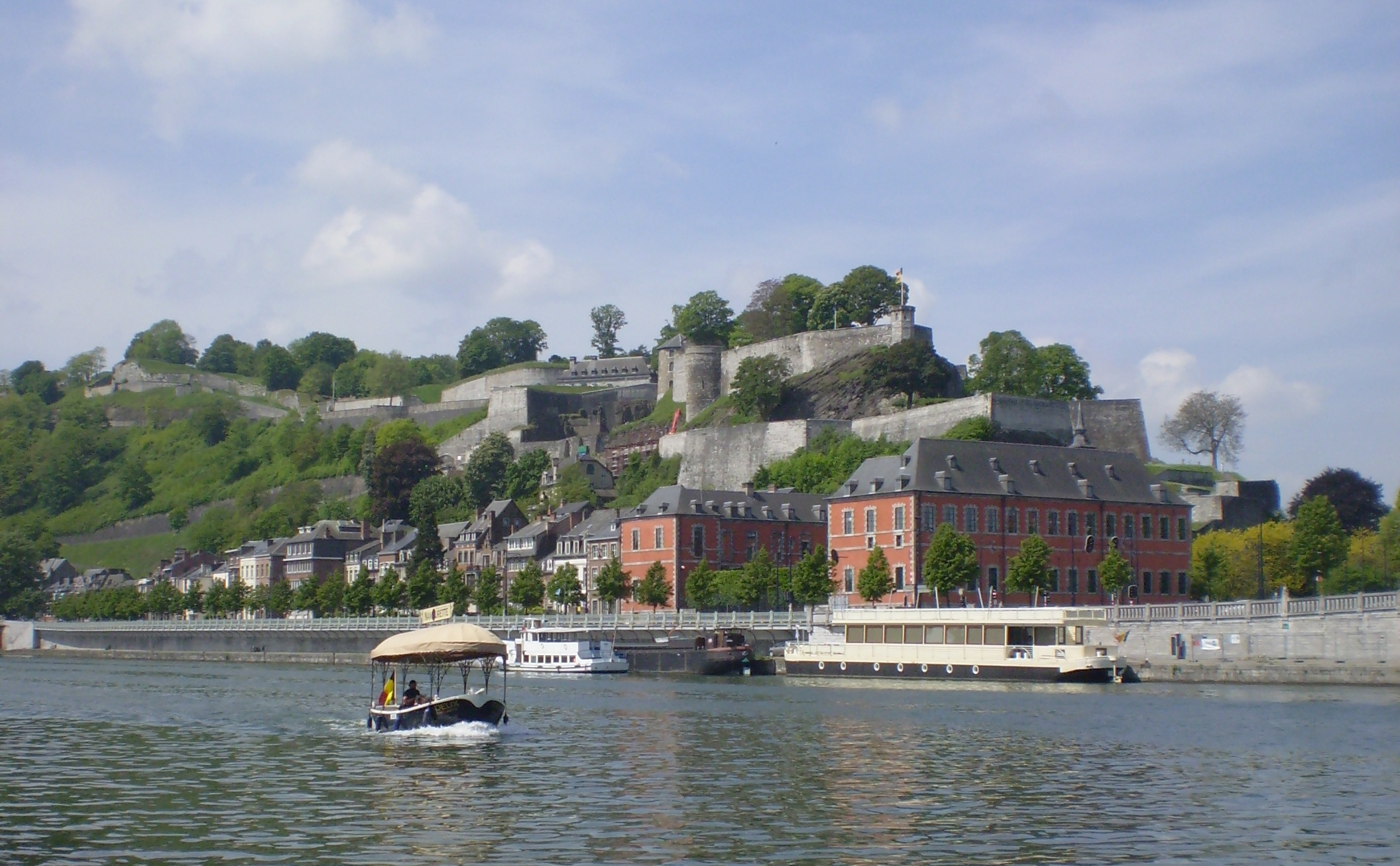 Vue de la Citadelle de Namur avec la namourette